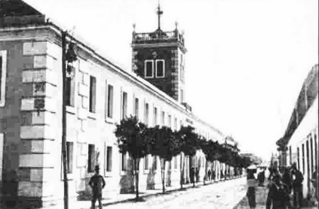 Instituto Nacional Central para Varones a principios del siglo XX.